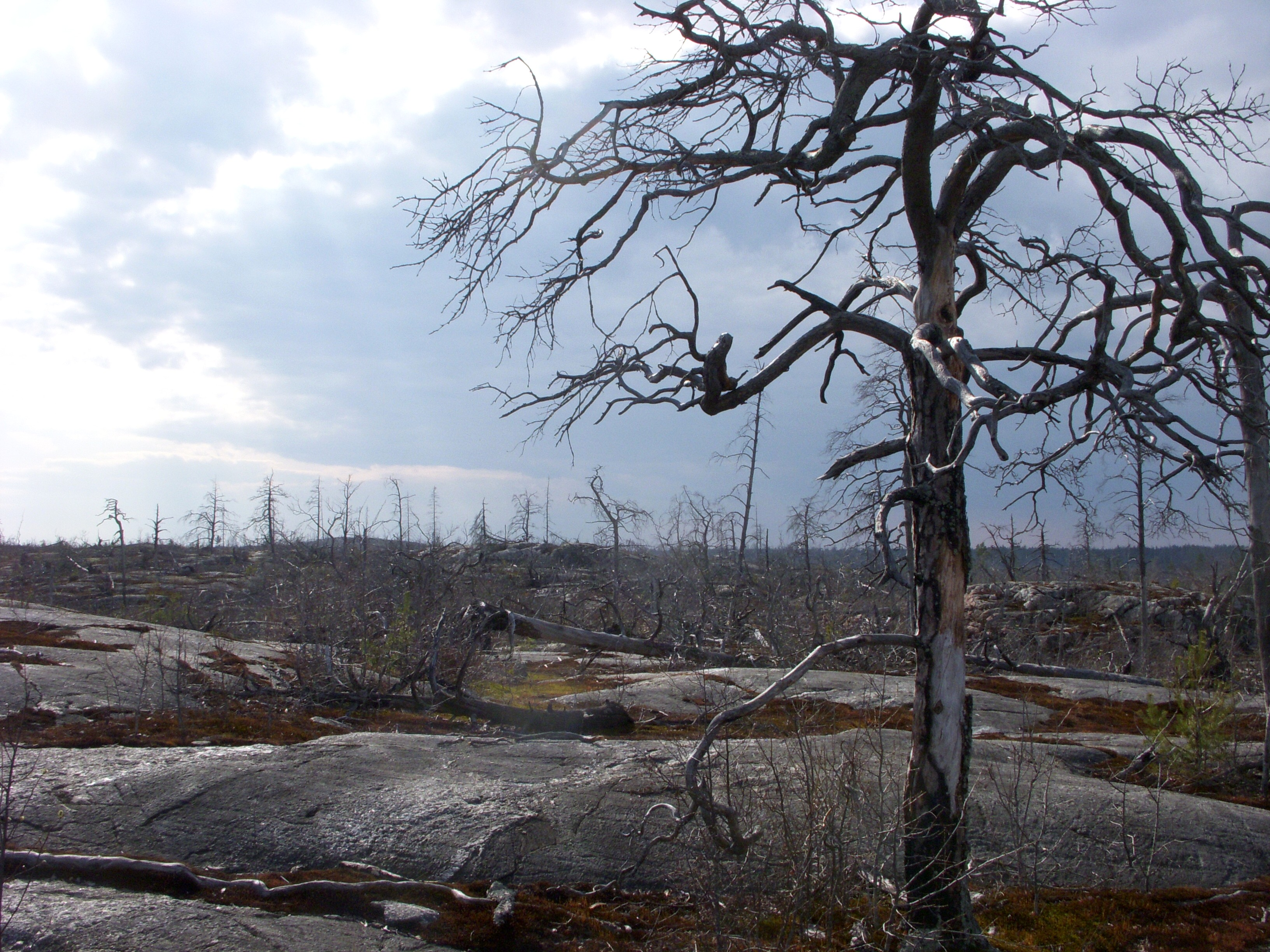 Tyresta Nationalpark, från brandområdet 1999